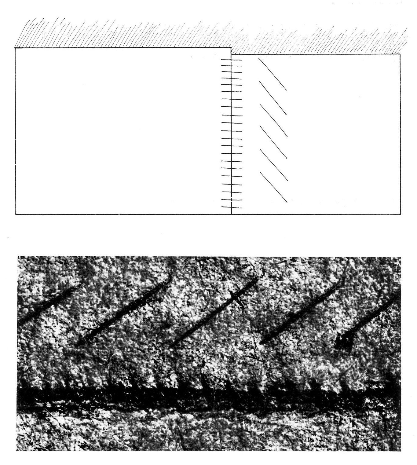 Nähte in der Kürschnerei: Absatz „Nähtechnik, Ledernähte, „Auftrittsnaht“.